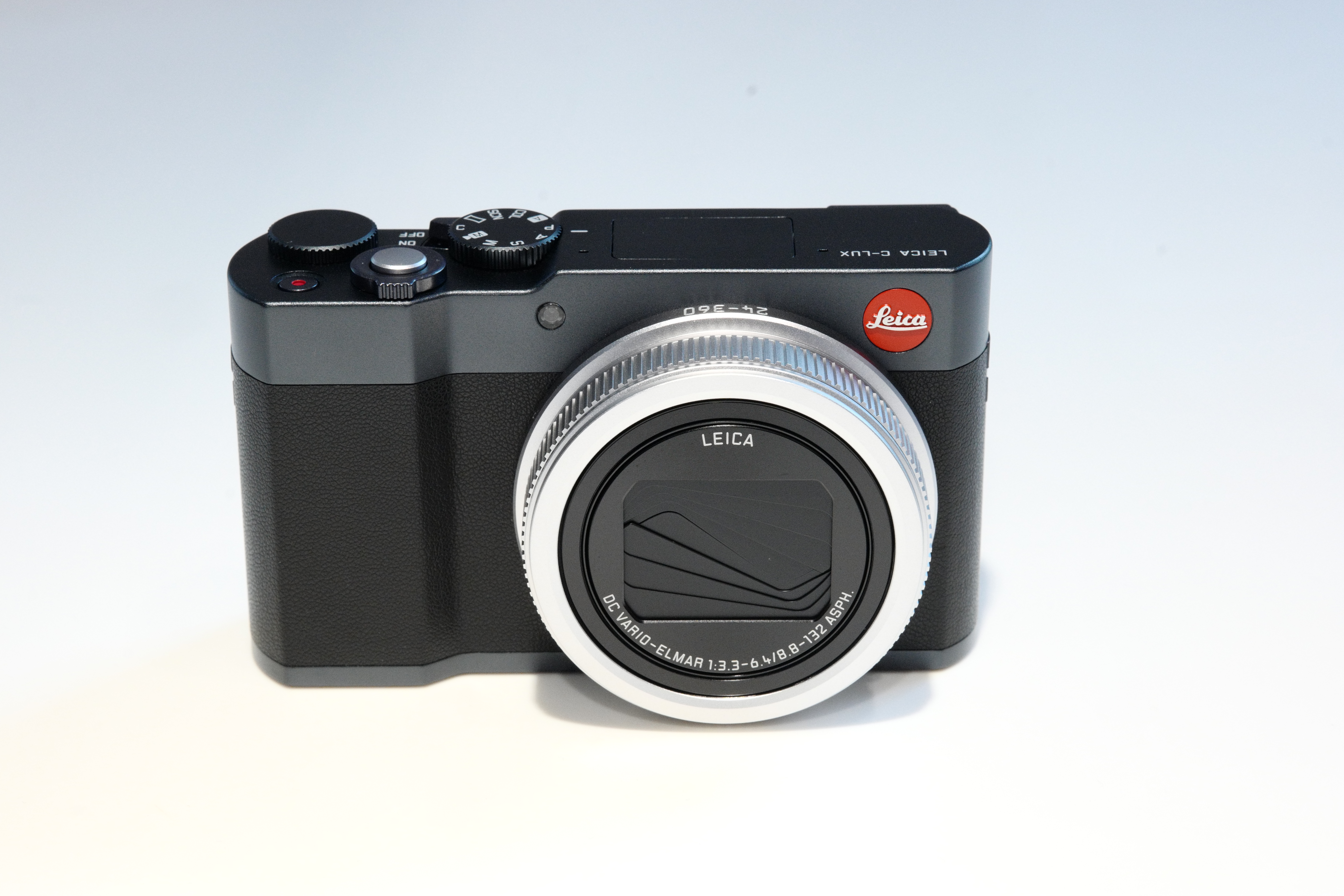 Leica C-Lux Midnight-Blue